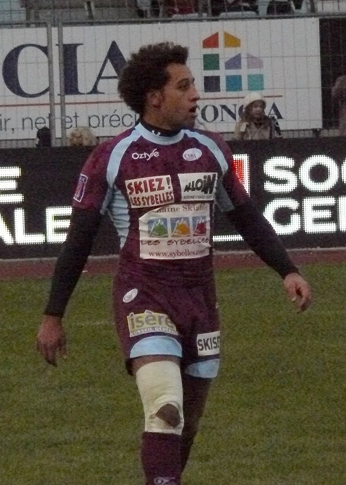 Matias Viazzo, 3/4 centre au CS Bourgoin-Jallieu, lors du match contre le Racing Métro 92, le 3 janvier 2010 à Colombes.